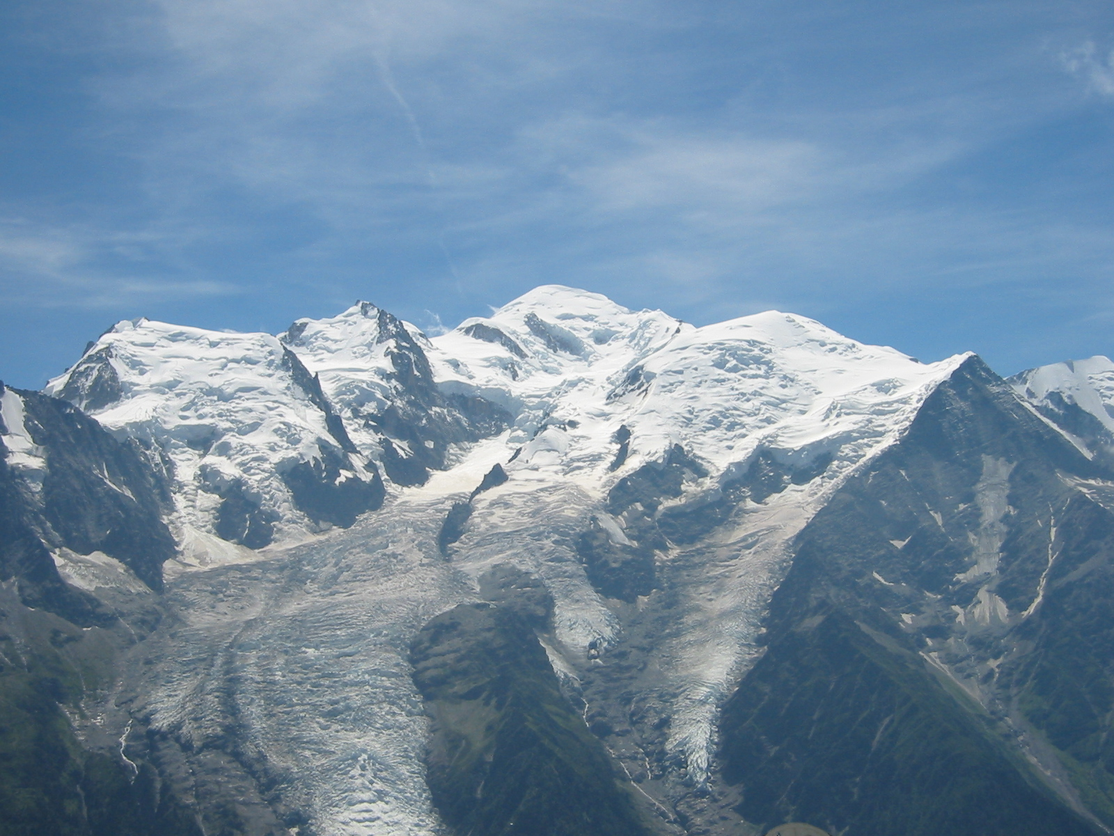 Massif du Mont-Blanc depuis le sommet du Brévent, 2006.